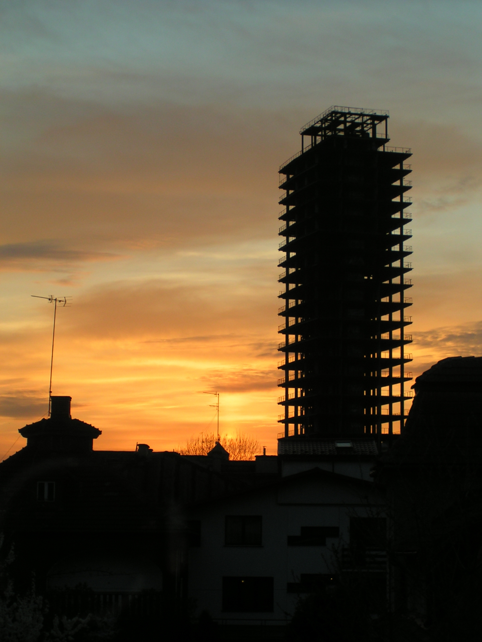 Szkieletor, Kraków